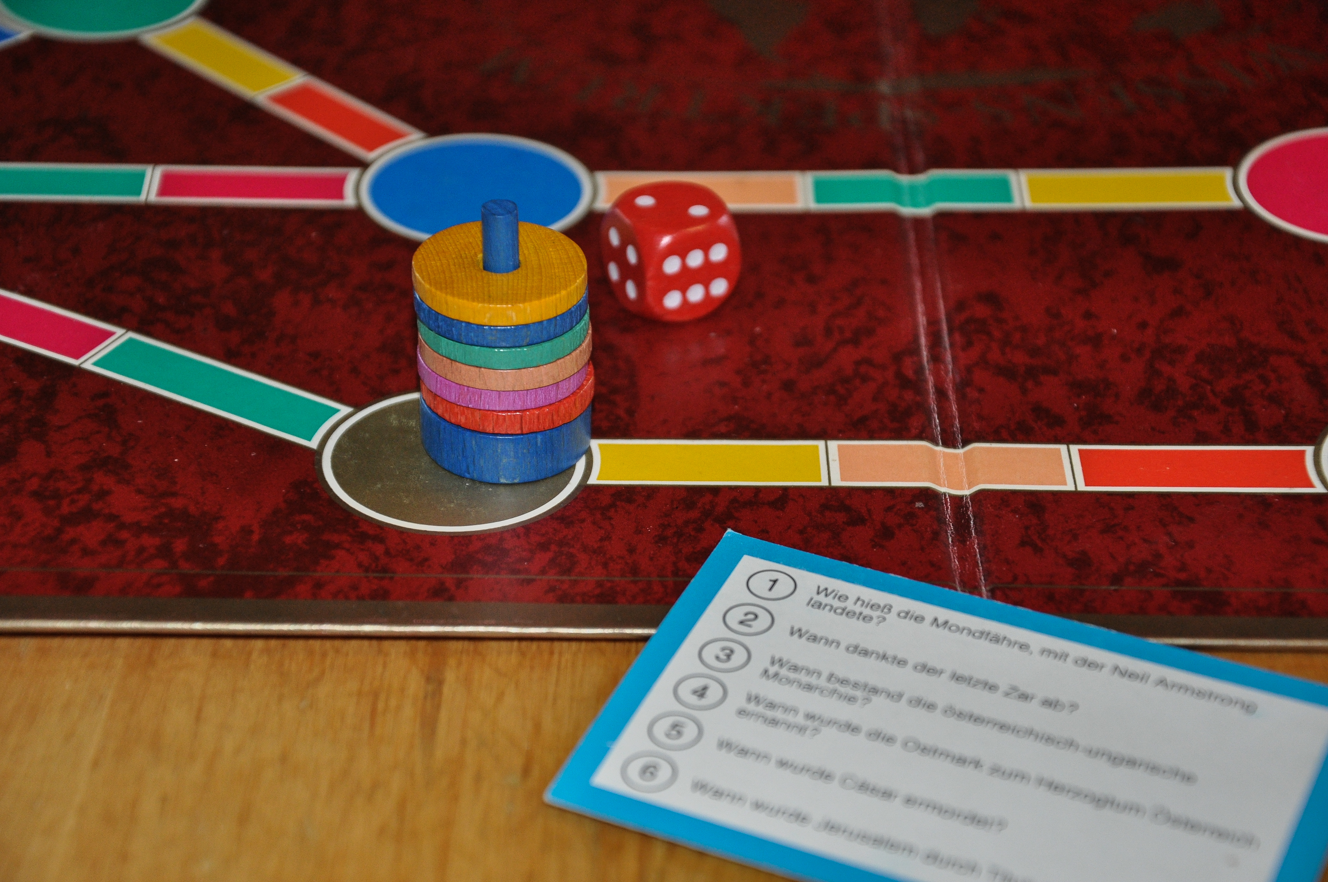 Wissens-Spektrum: Spielmaterial